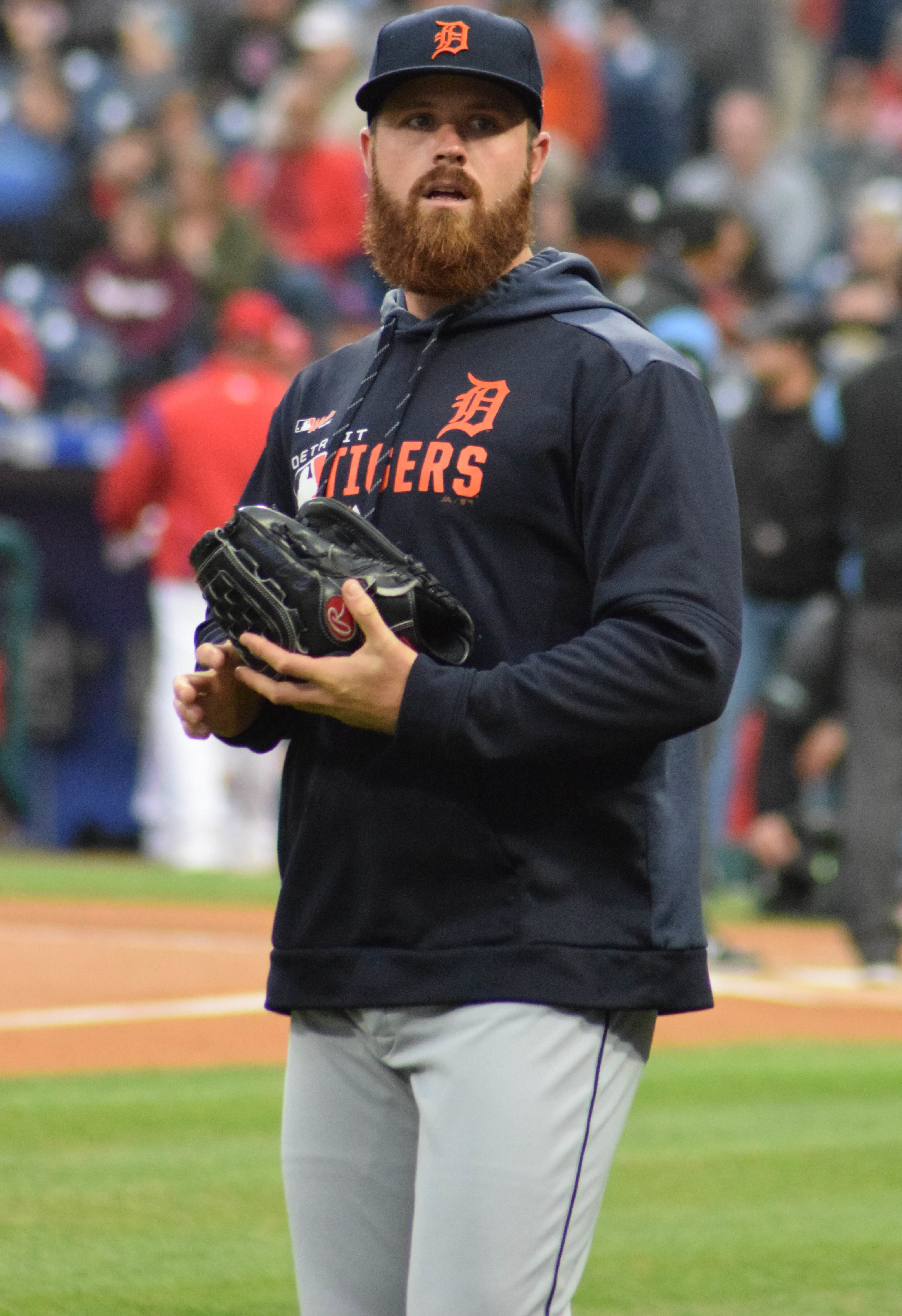 Buck Farmer